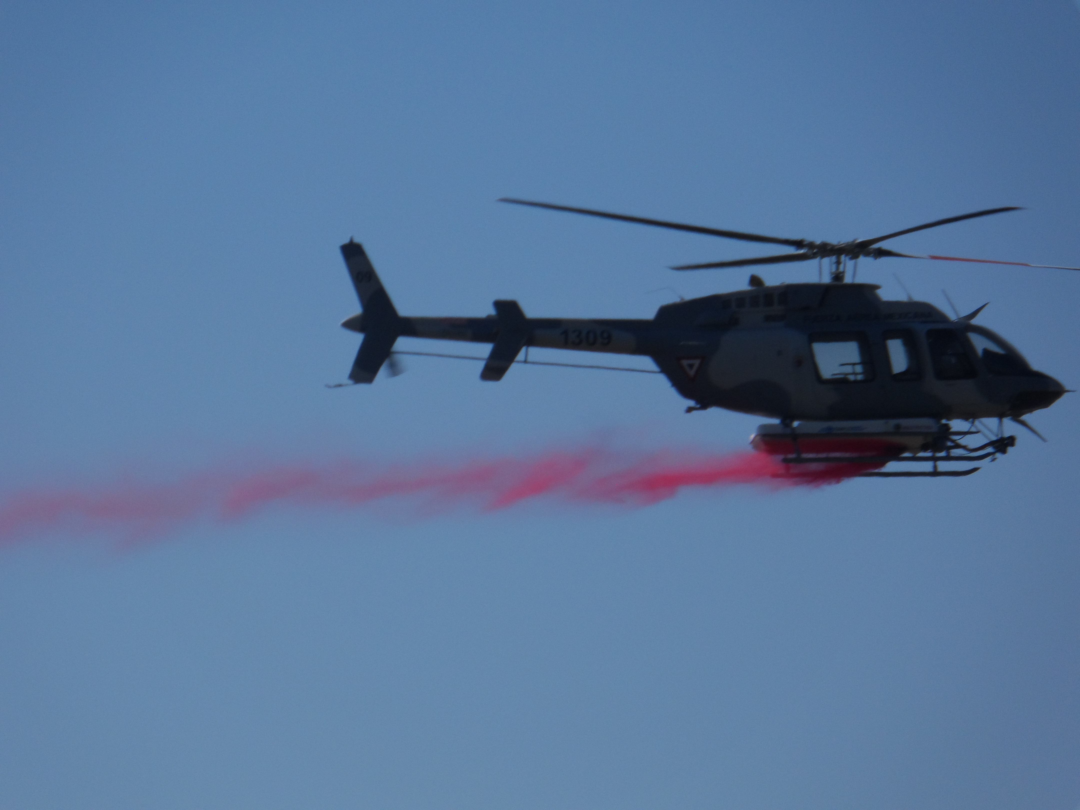 Helicóptero Bell 407 GX de la Fuerza Aérea Mexicana, perteneciente al Escuadrón Aéreo 111, realizando una demostración de fumigación a plantiós de enervantes durante el "Espectáculo Aéreo Jalisco 2017", realizado el 28 de Octubre del 2017, en la BAM No. 5, en Zapopan, Jalisco.